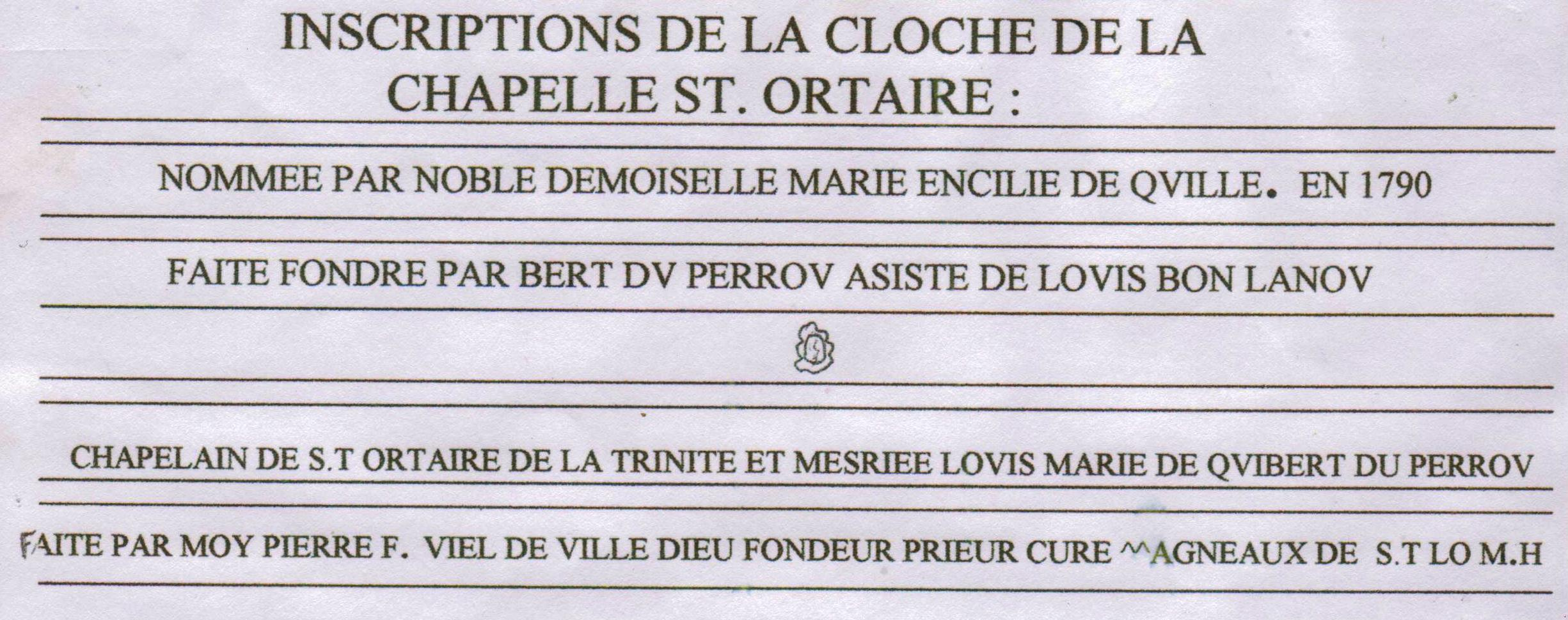 Inscriptions se trouvant sur la cloche de la chapelle Saint Ortaire